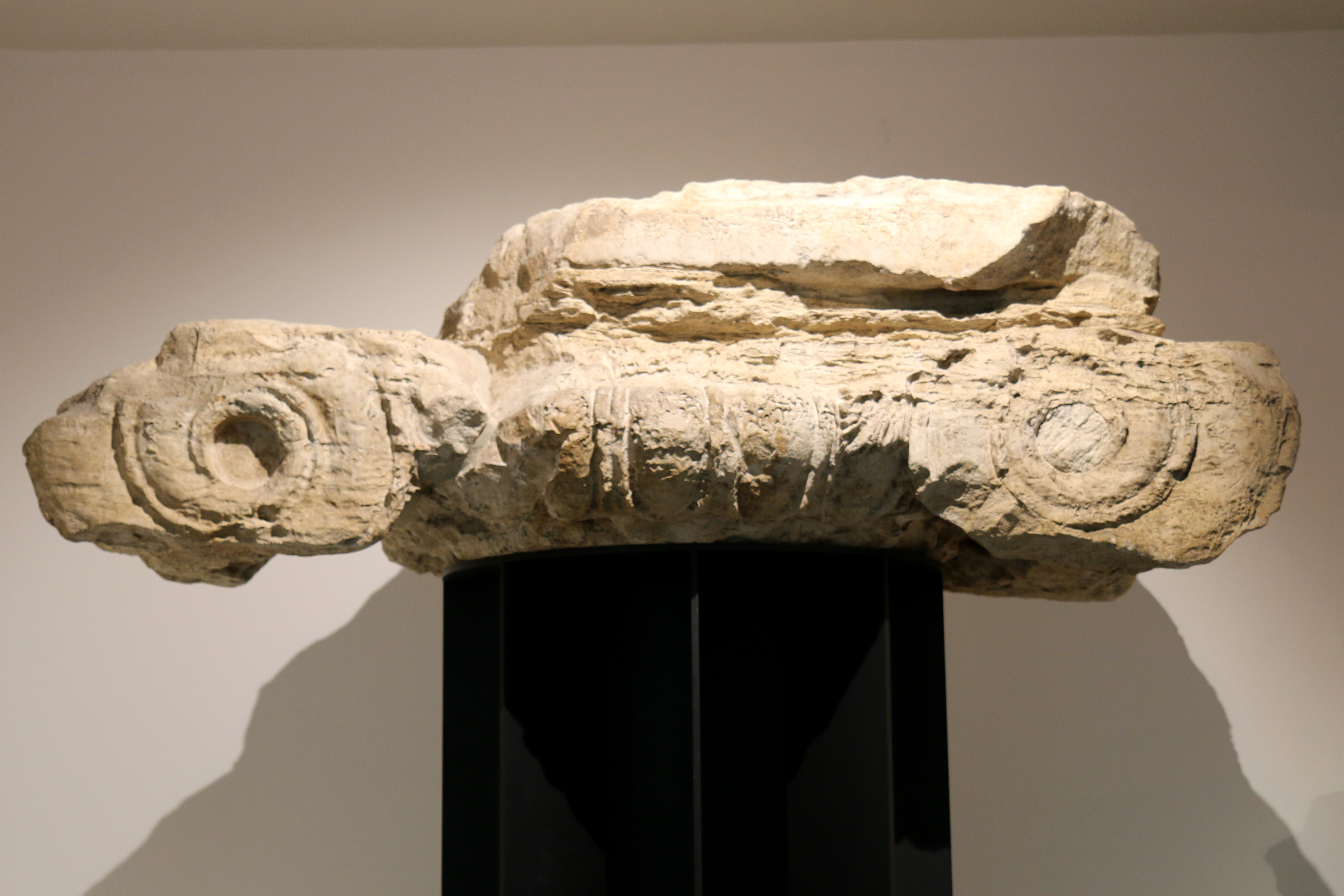 Chapiteau ionique au musée d'histoire de Marseille.